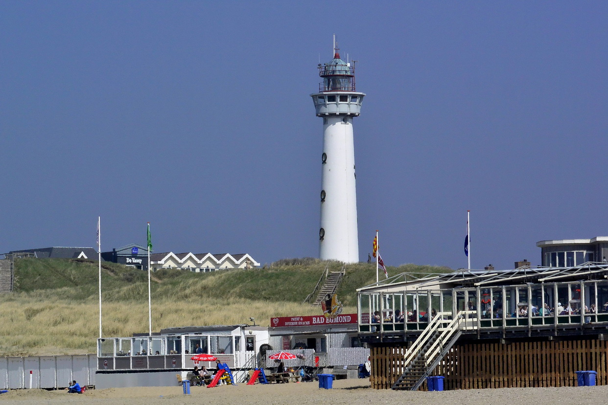 Egmond aan Zee, Leuchtturm